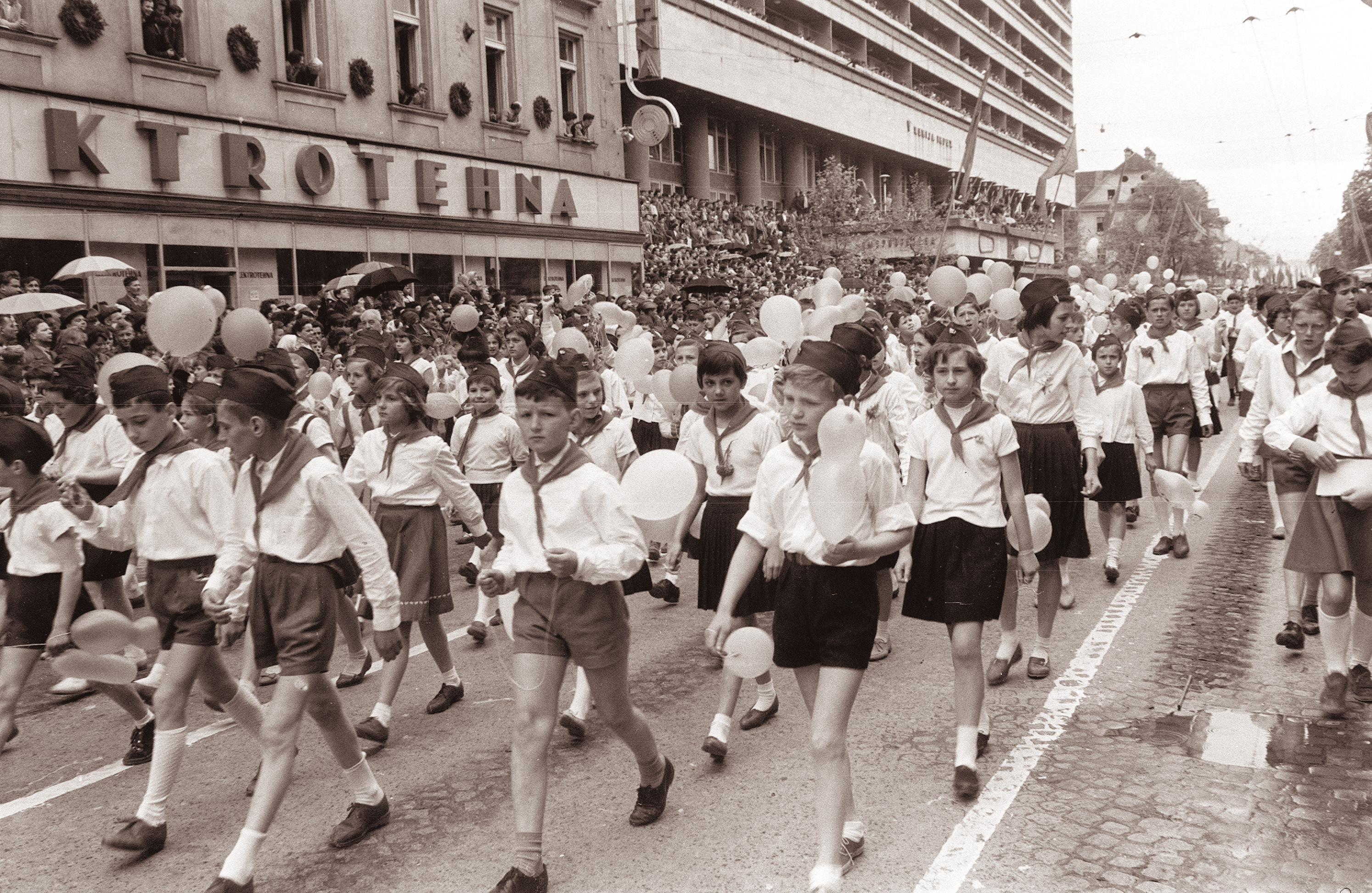 Prvomajski sprevod v Ljubljani